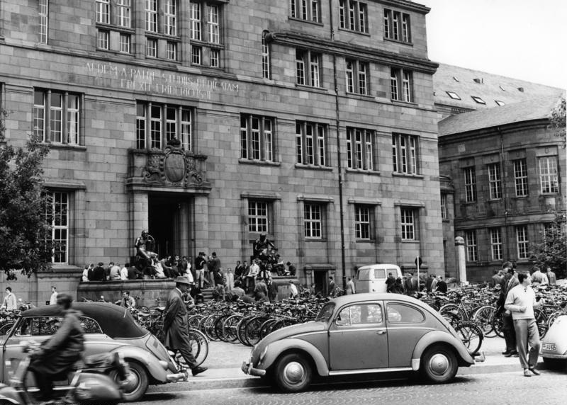 6.6.1961 Freiburg/Breisgau Albert-Ludwigs-Universität